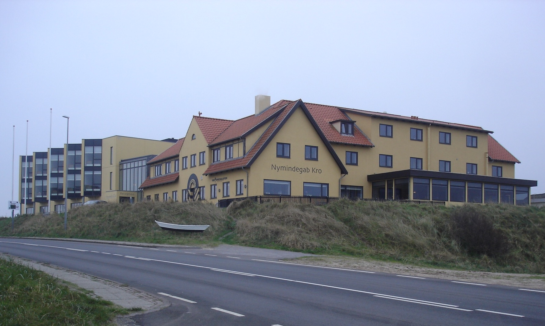 Nymindegab Kro set fra nordvest.